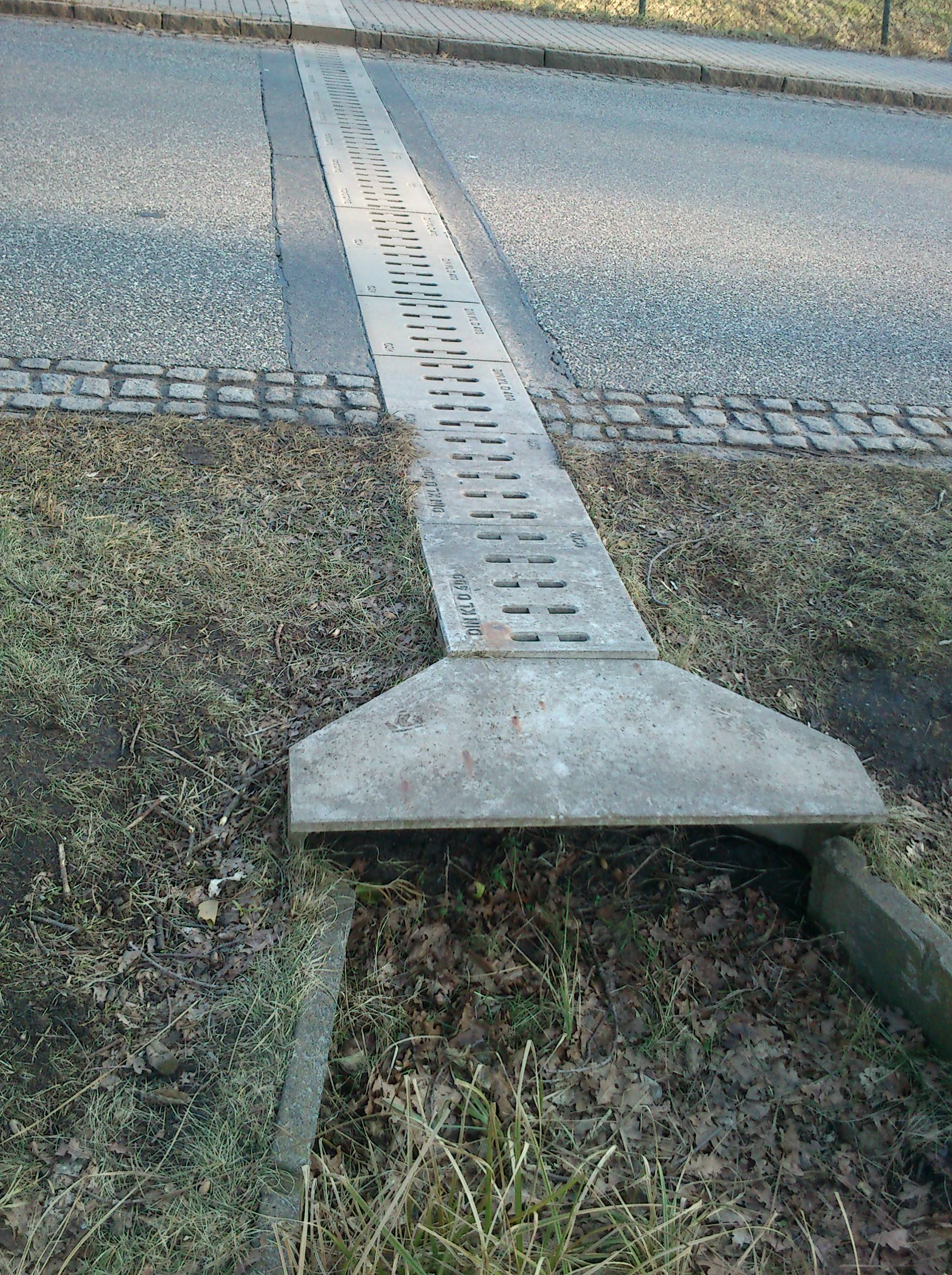 Amphibientunnel unter der Rennbahnallee in Hoppegarten.